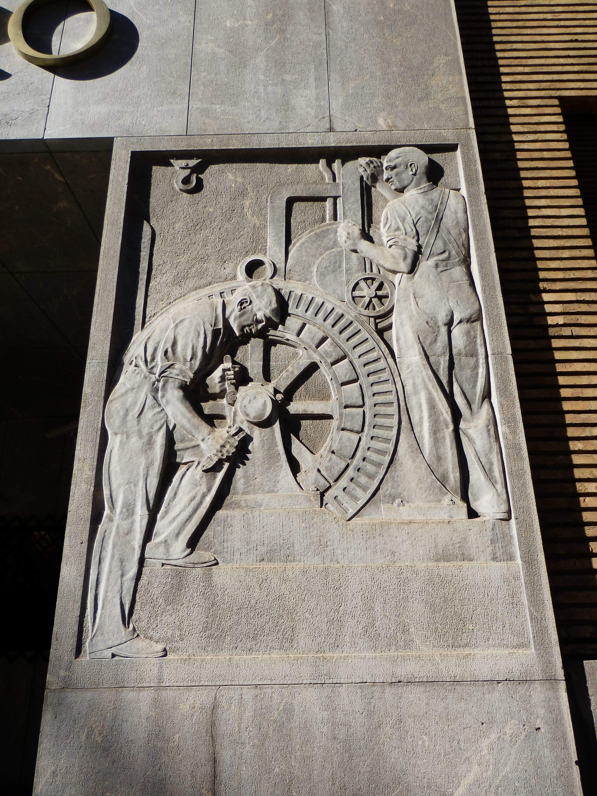 Edificio de la Confederación Hidrógrafica del Ebro.